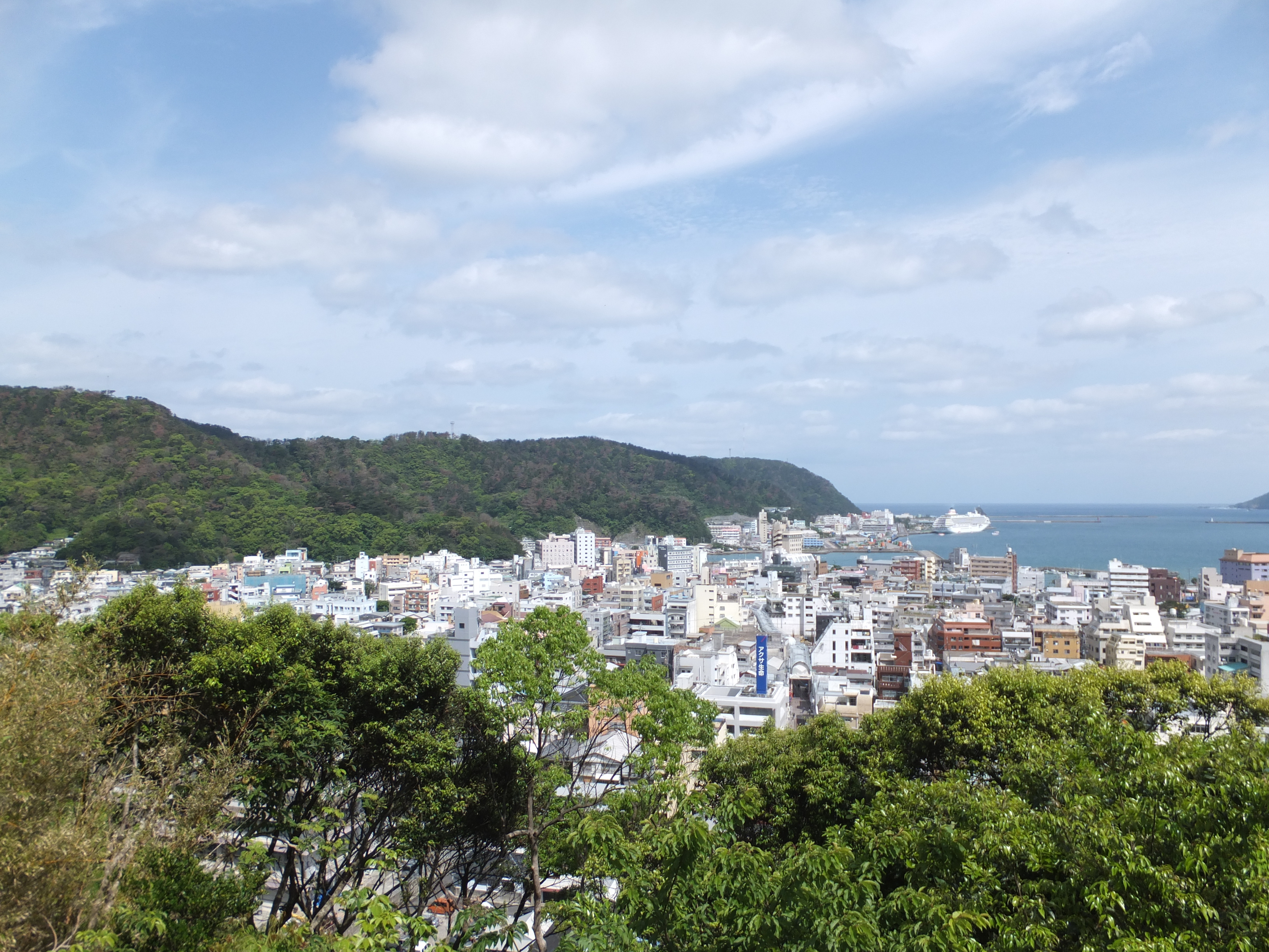 奄美市中心部